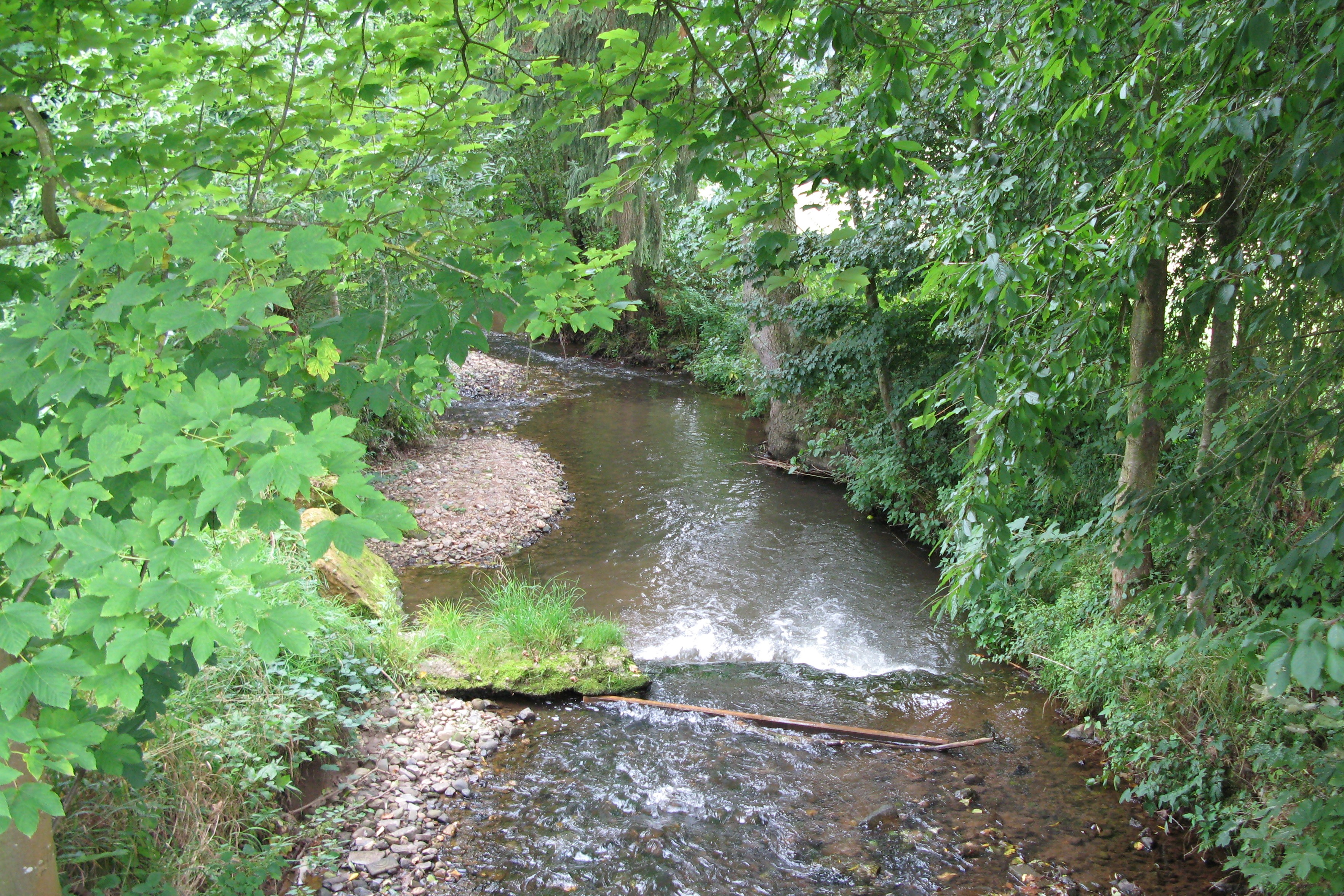 D'Routbaach zu Platen. Kategorie:Baachen zu Lëtzebuerg